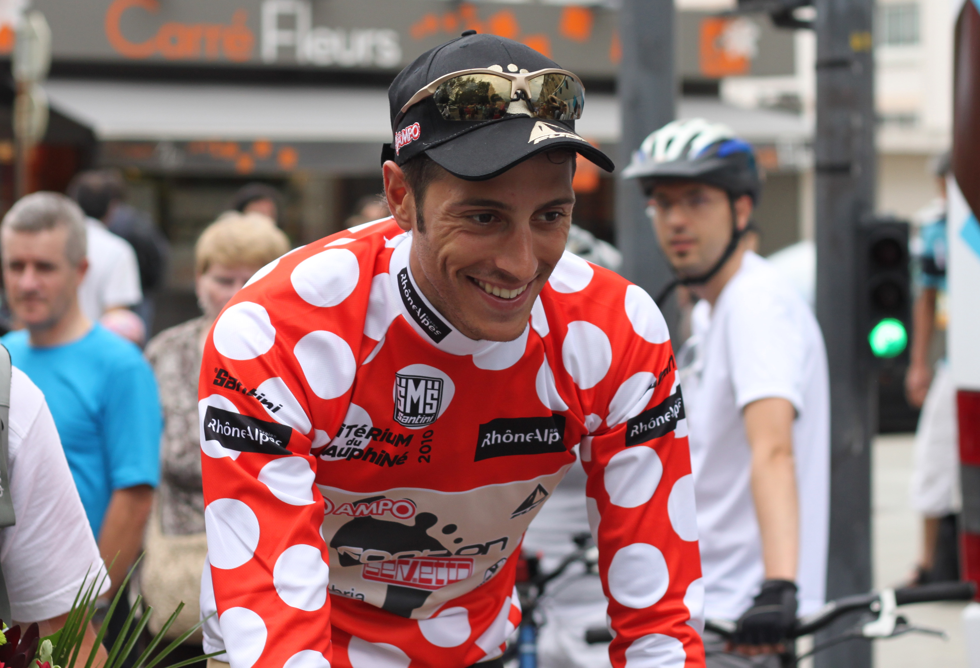 Eros Capecchi après l'obtention du maillot du meilleur grimpeur après la 5e étape du Critérium du Dauphiné 2010